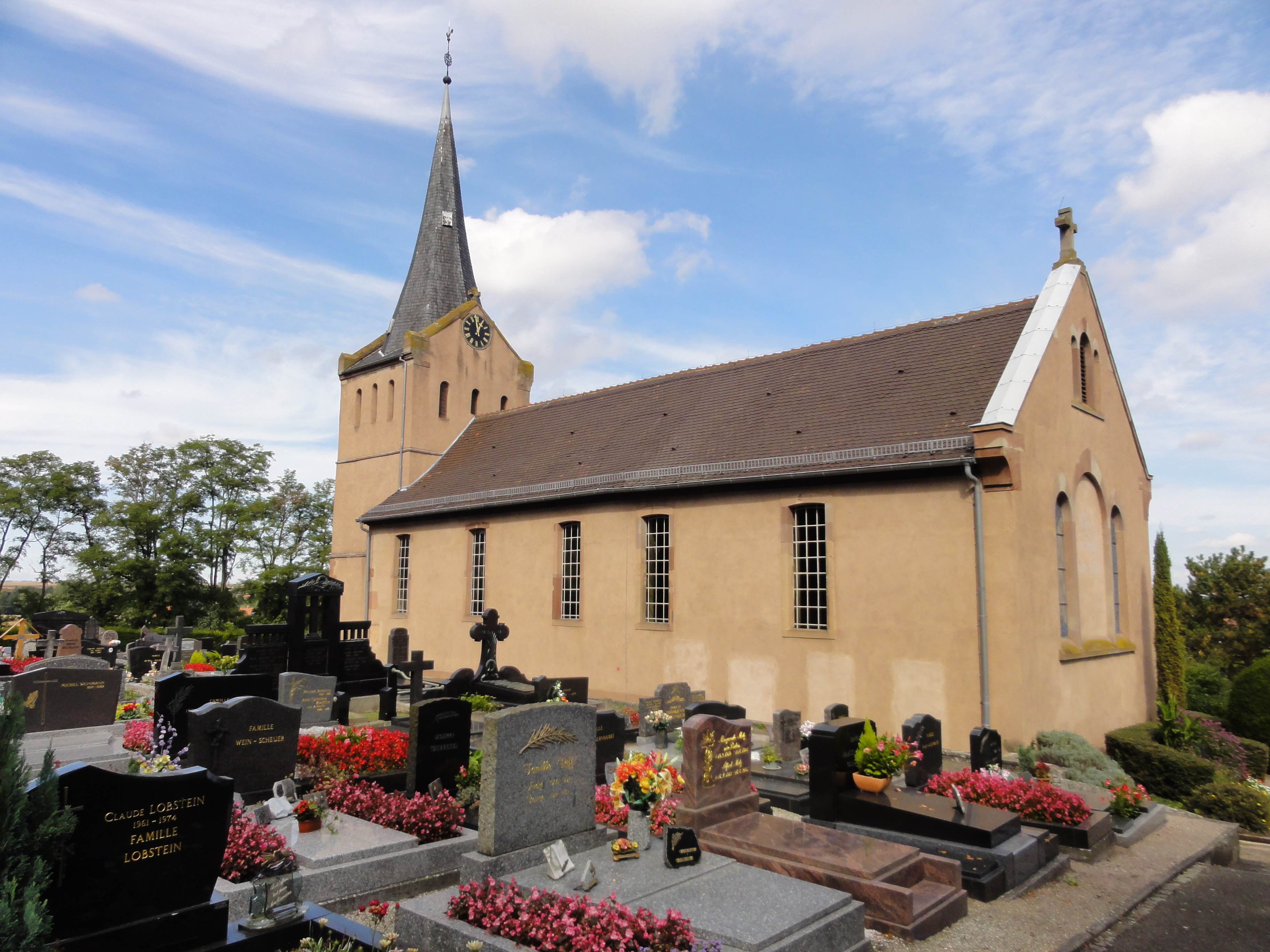 Alsace, Bas-Rhin, Église protestante de Mundolsheim (PA00084810, IA67007261).